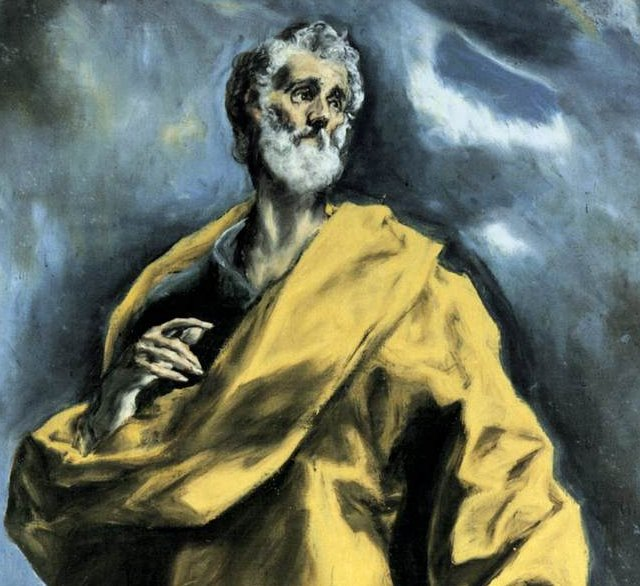 La obra representa al apóstol San Pedro, el primer papa de la Iglesia Católica.